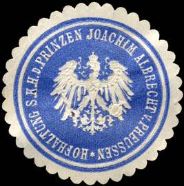 Sealing stamp Title: Hofhaltung Seiner Königlichen Hoheit des Prinzen Joachim Albrecht von Preussen Description: blau, weiß, geprägt Place: size: 3 cm